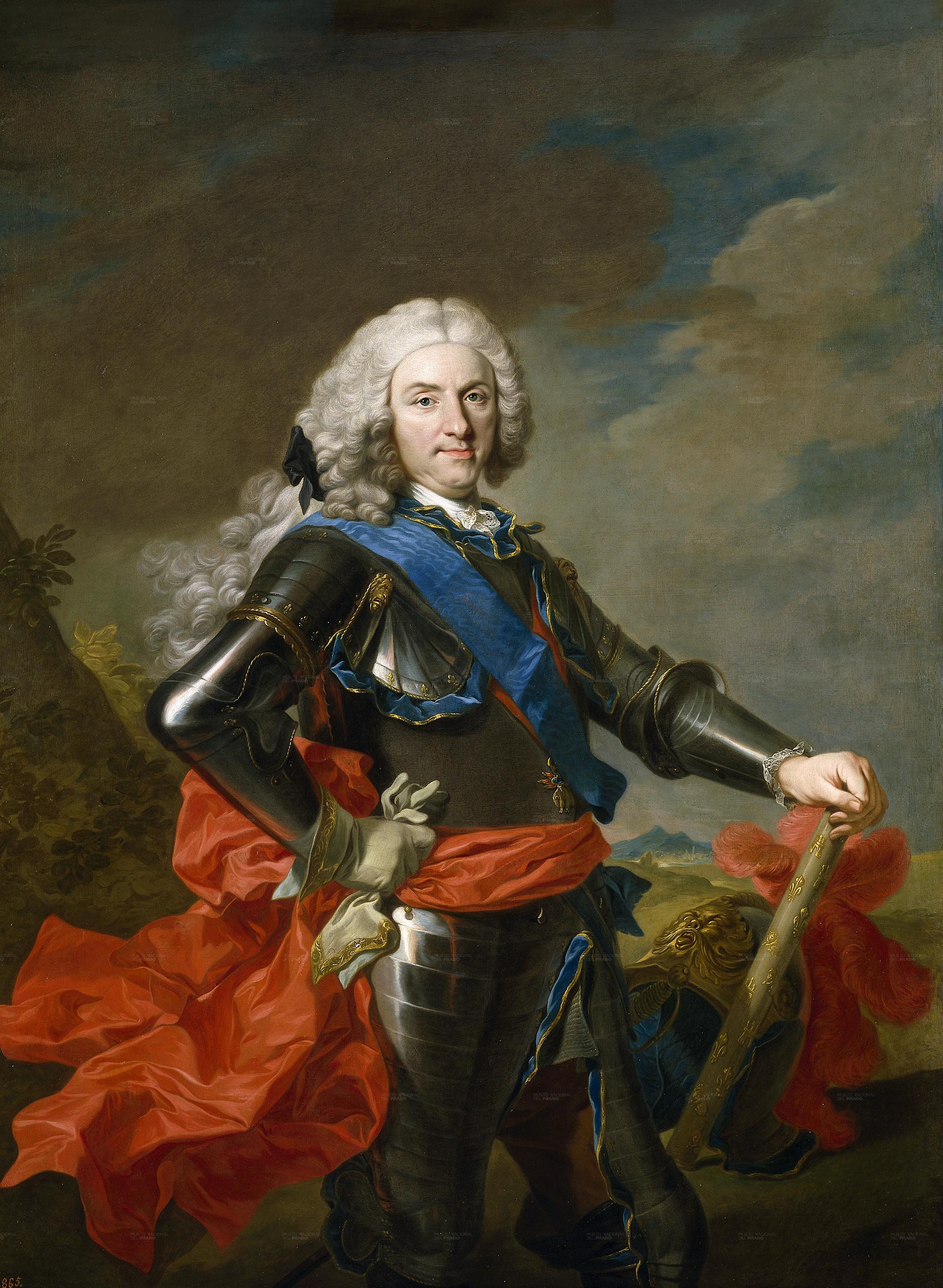 Retrato del rey Felipe V de España (1683-1746), que fue nieto del rey Luis XIV de Francia y el primer rey de la Casa de Borbón en España.